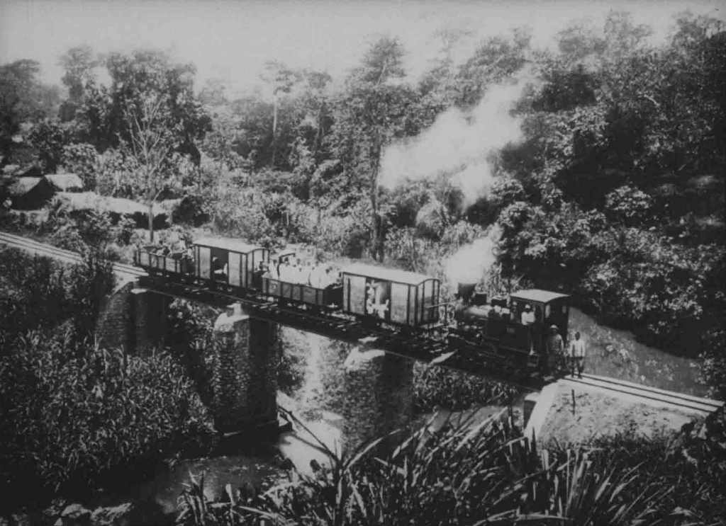 Zug der Sigibahn